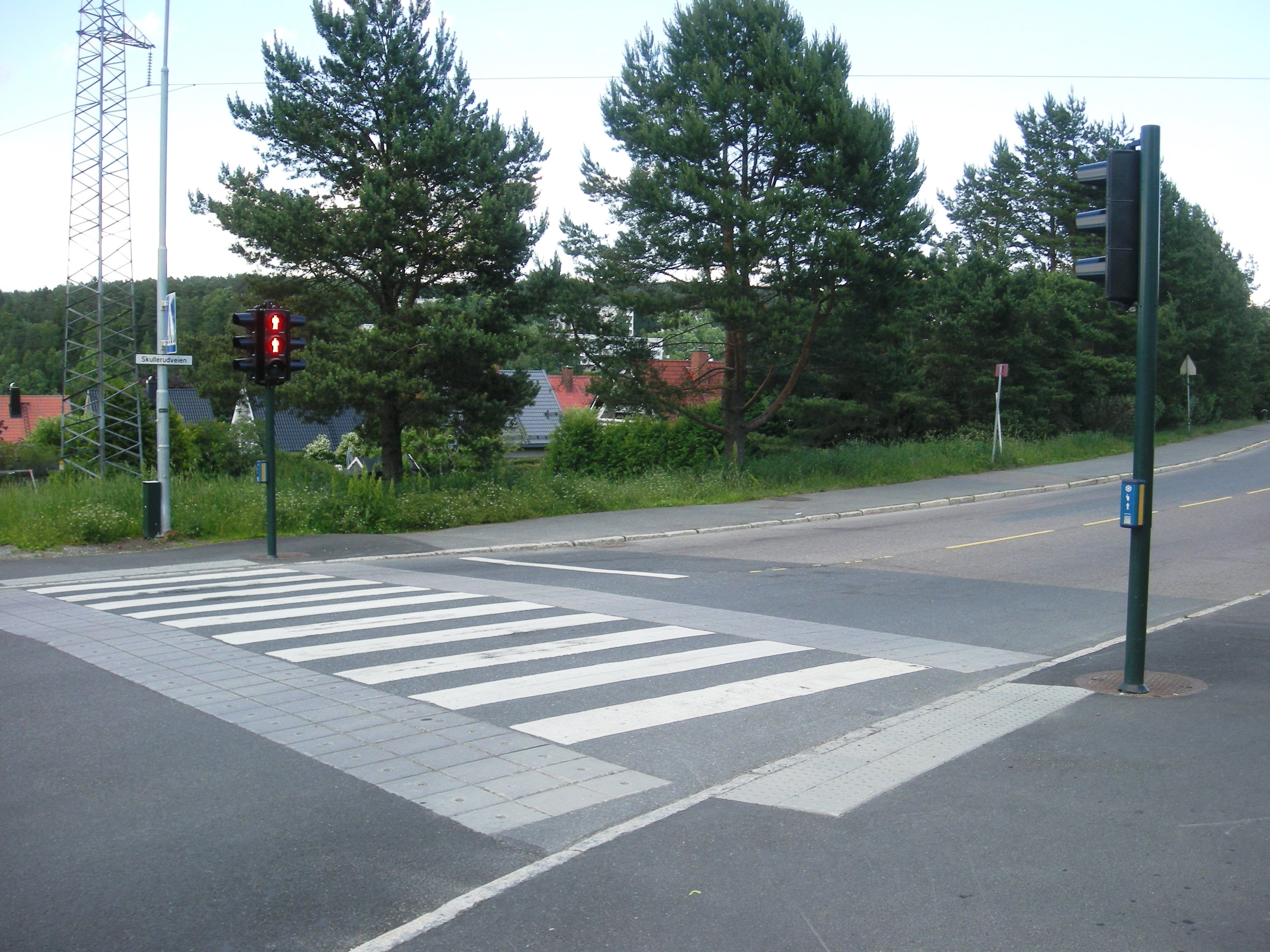 Skullerudveien i Oslo